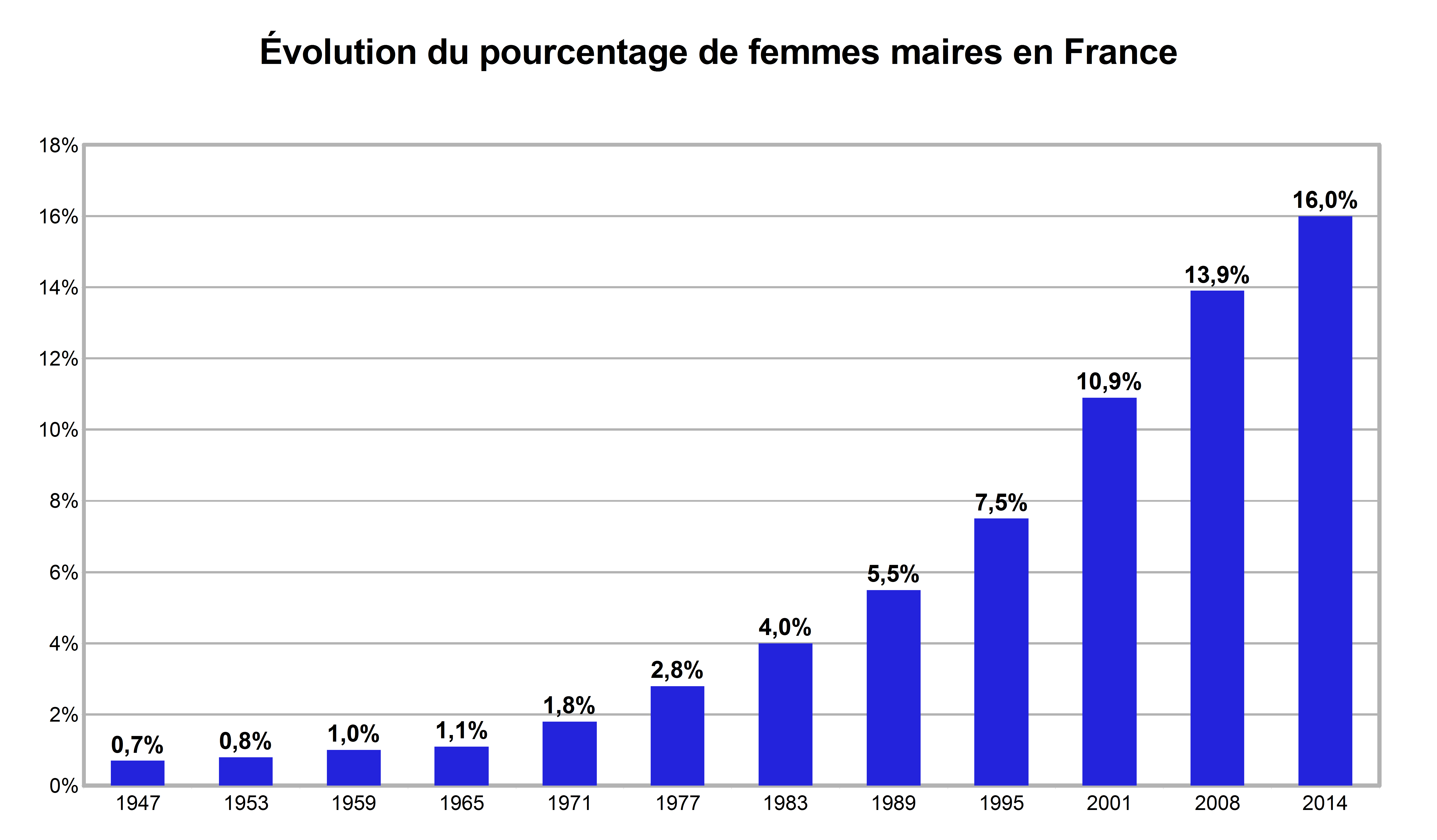 Évolution du nombre de femmes maires en France de 1947 à 2014.